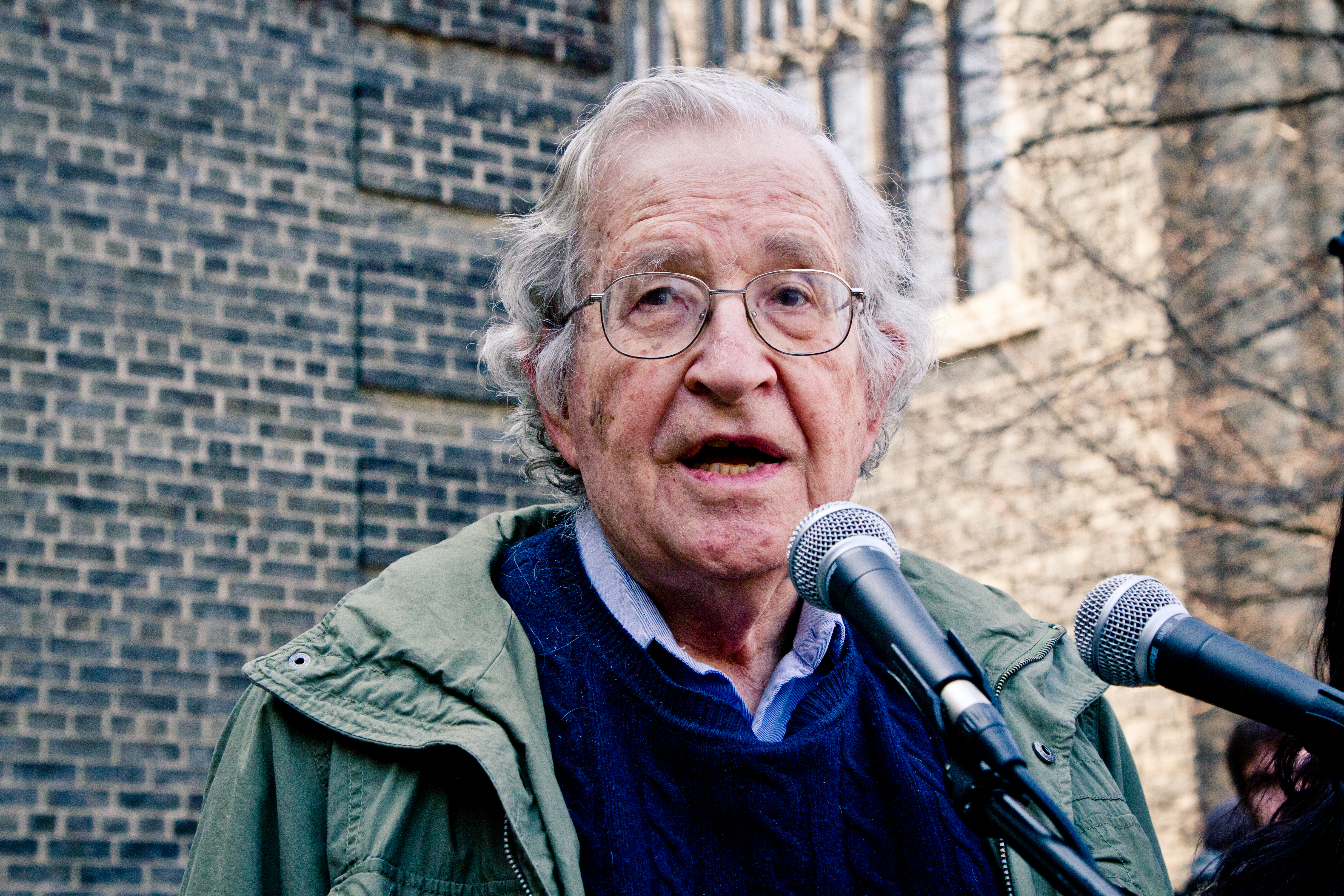 chomsky-1893